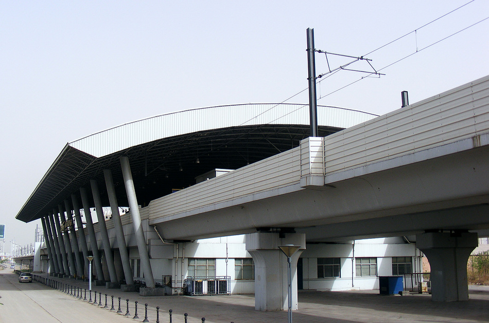 中文（中国大陆）: 胡家园站（地铁津滨线）